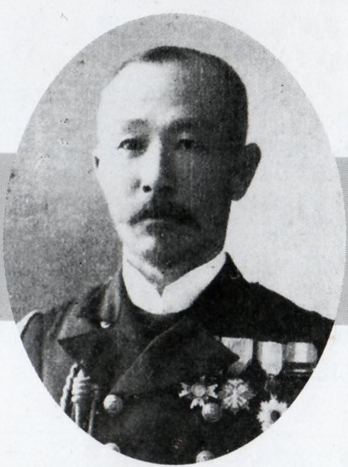 Yamada Hikohachi is an Imperial Japanese Navy Vice Admiral